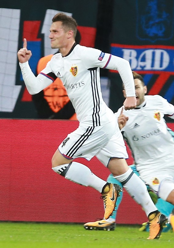 Taulant Xhaka